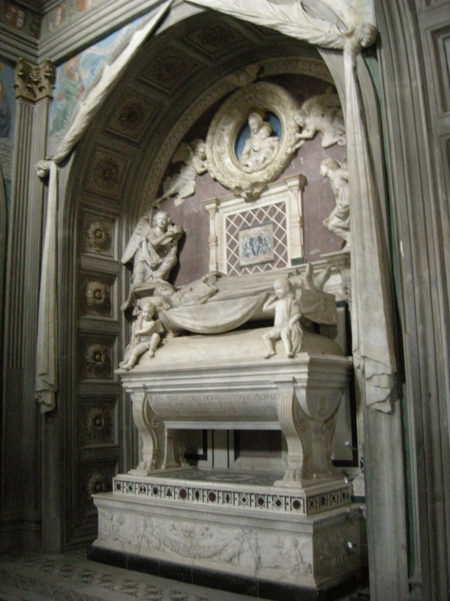 Cappella del cardinale di portogallo 03 tomba del cardinale di antonio e bernardo rossellino 02.1